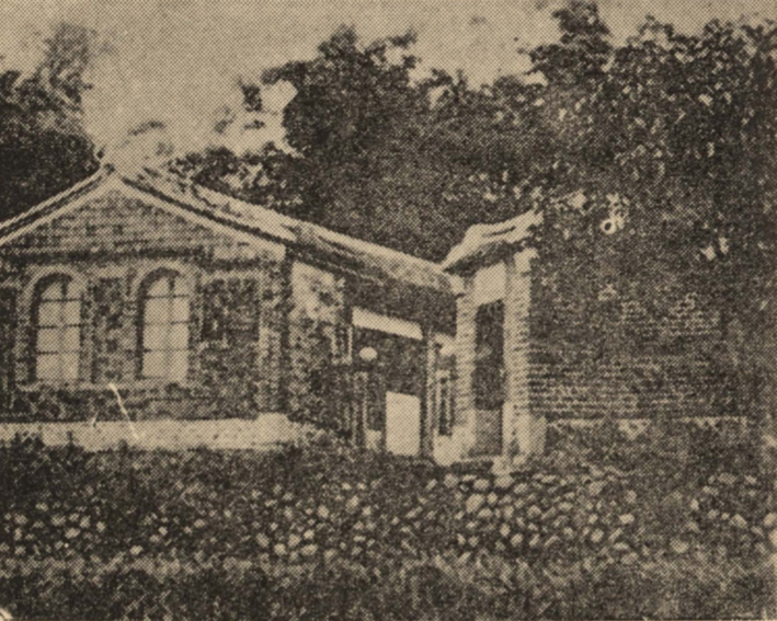 中文（台灣）: 新竹州苗栗郡四湖庄役場